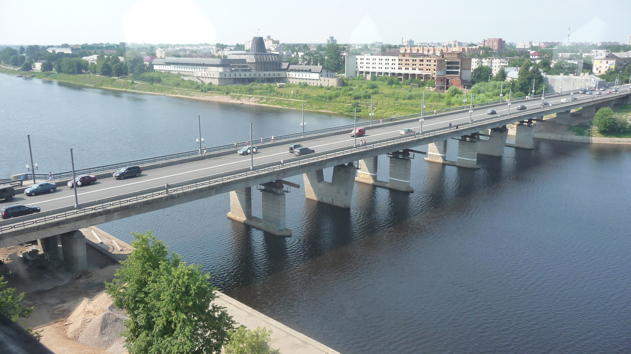 Ольгинский мост через Великую реку со смотровой площадки на Власьевской башне во Пскове.